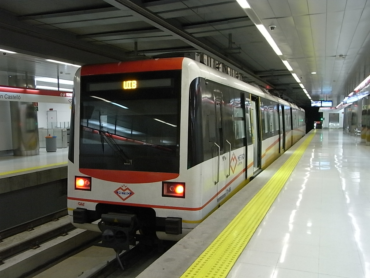 U-Bahnhof Son Castelló in Palma (Mallorca), Zug in Richtung Universität